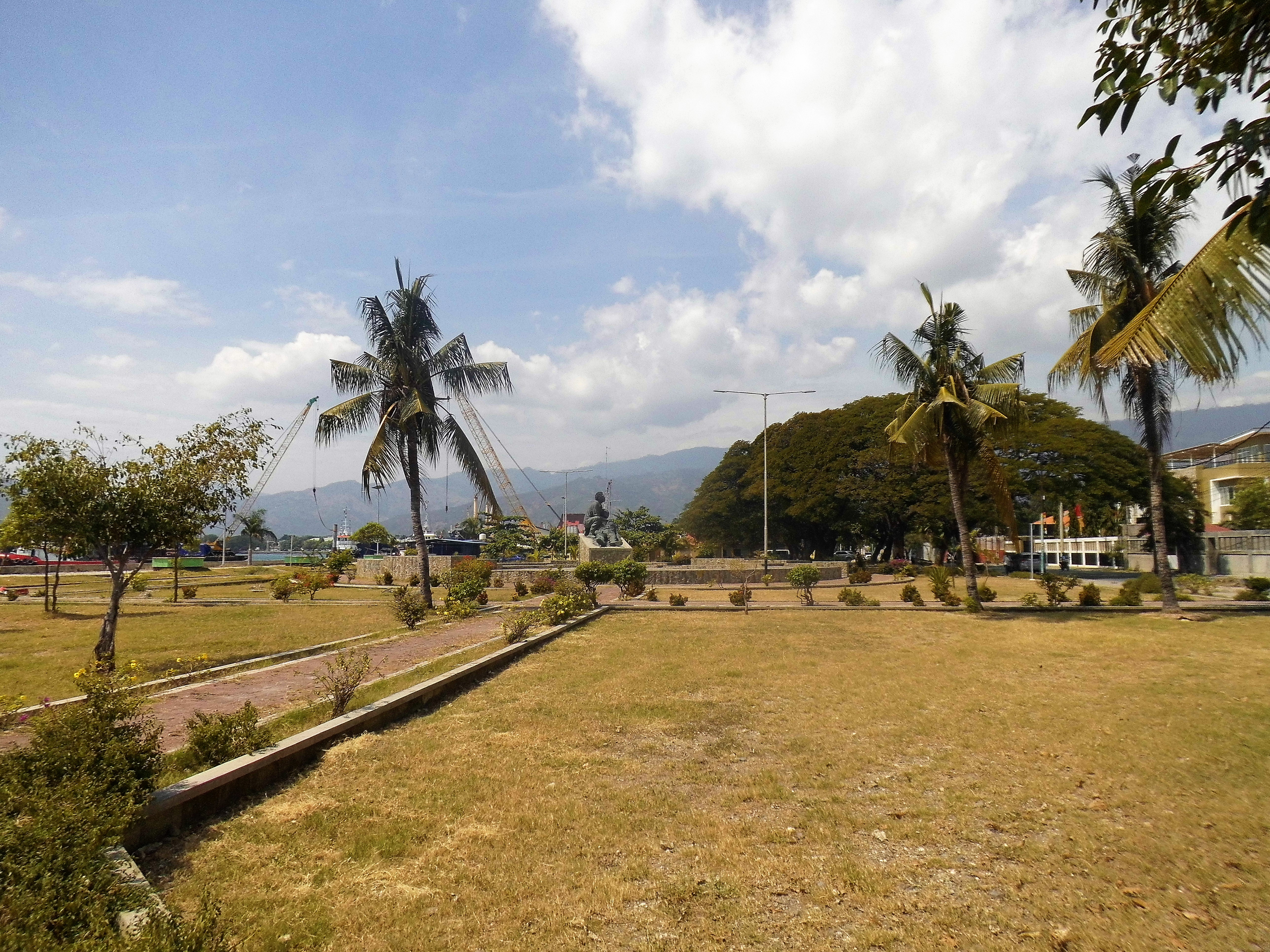 Jardim Borja